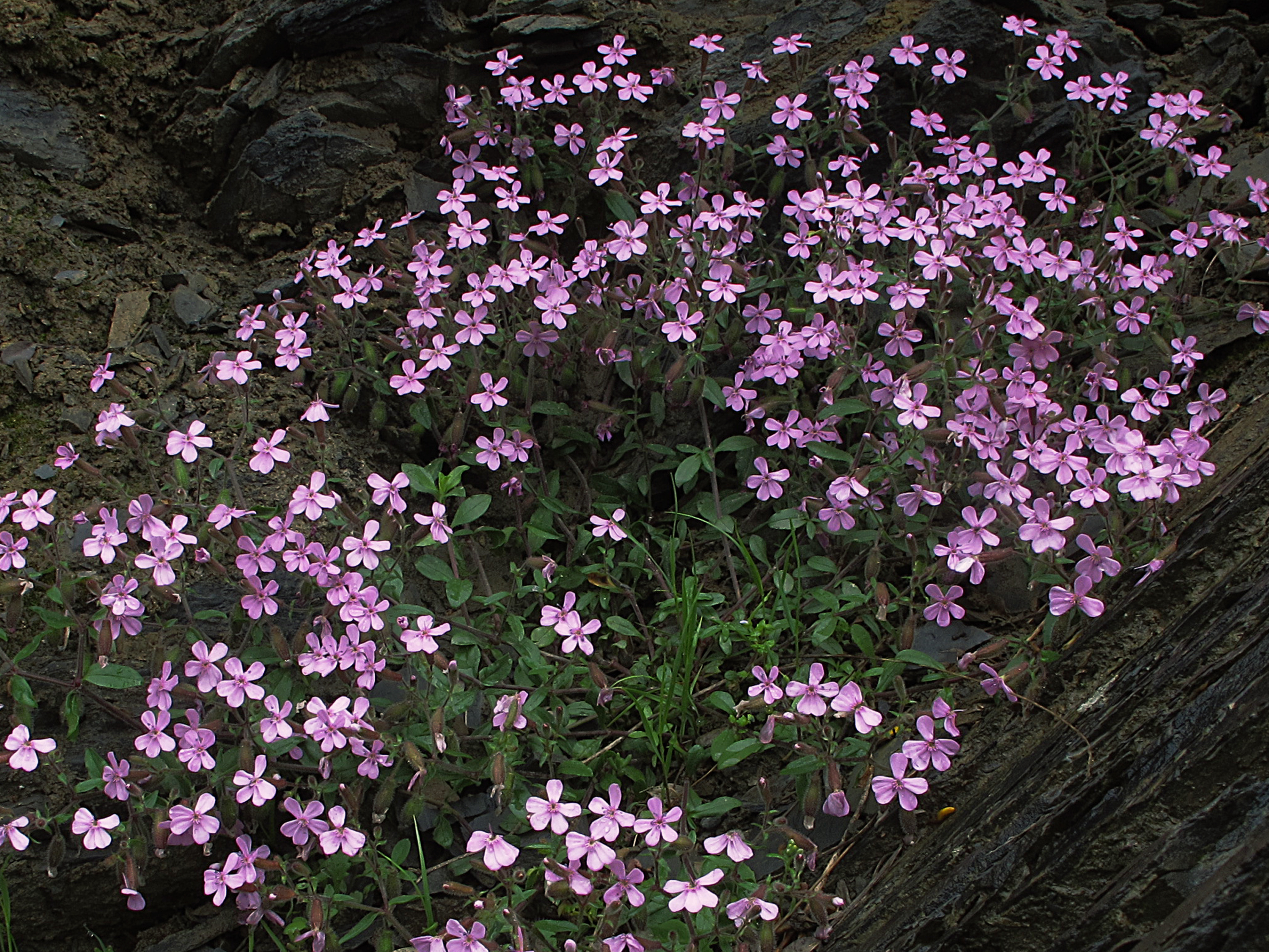 Hábitat: Grietas de rocas calizas extraplomadas. Endémica pirenaico-central. Incluida en el Catálogo de Especies Amenazadas de Aragón por su interés especial.